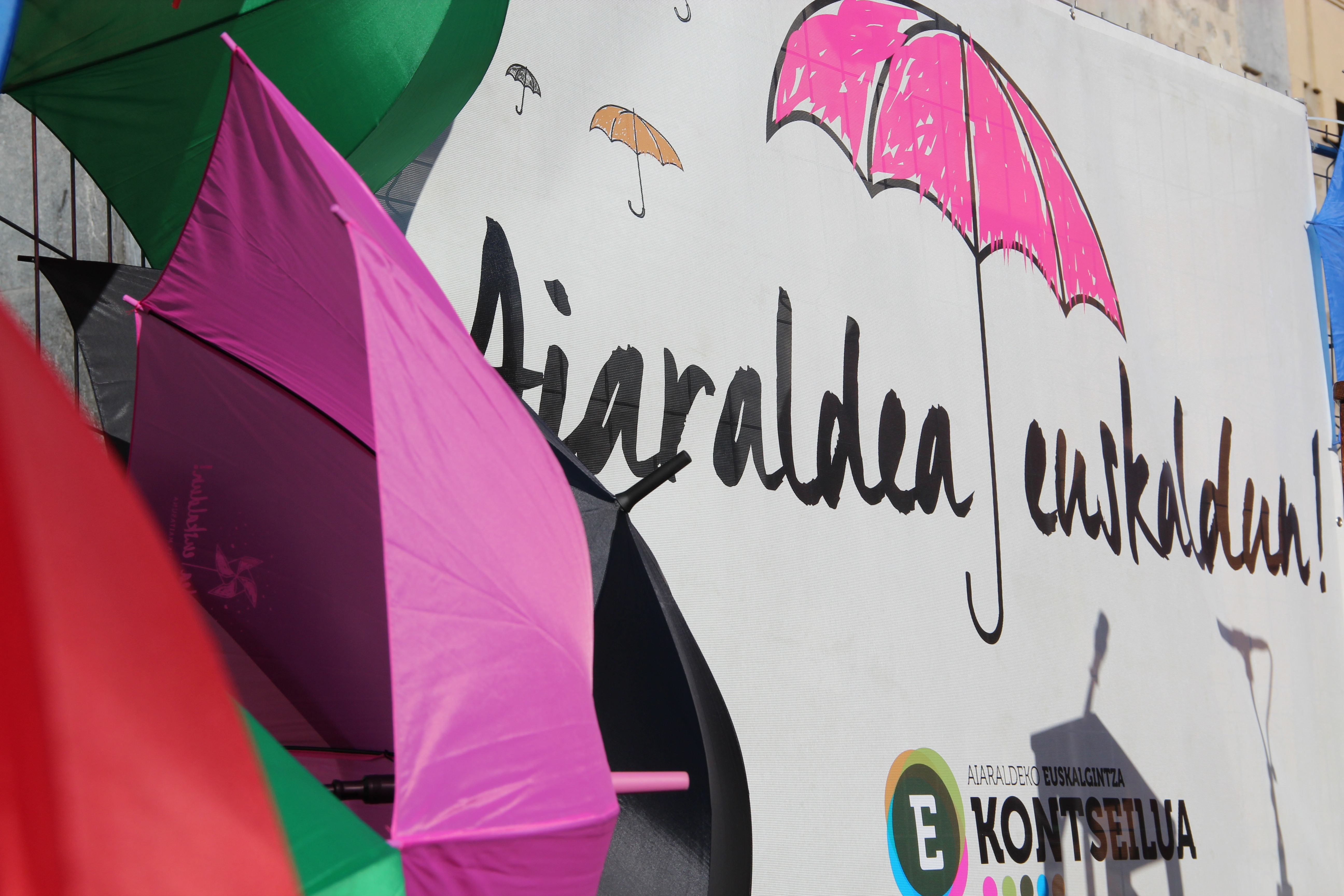 2016 Aiaraldea Euskararen Eguna Amurrion